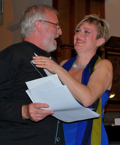 Gitta-Maria Sjöberg kåres som æreskunstner i Østermarie 2012 og får overrakt diplomet af præsidenten for KulturBornholm, Carsten Seeger